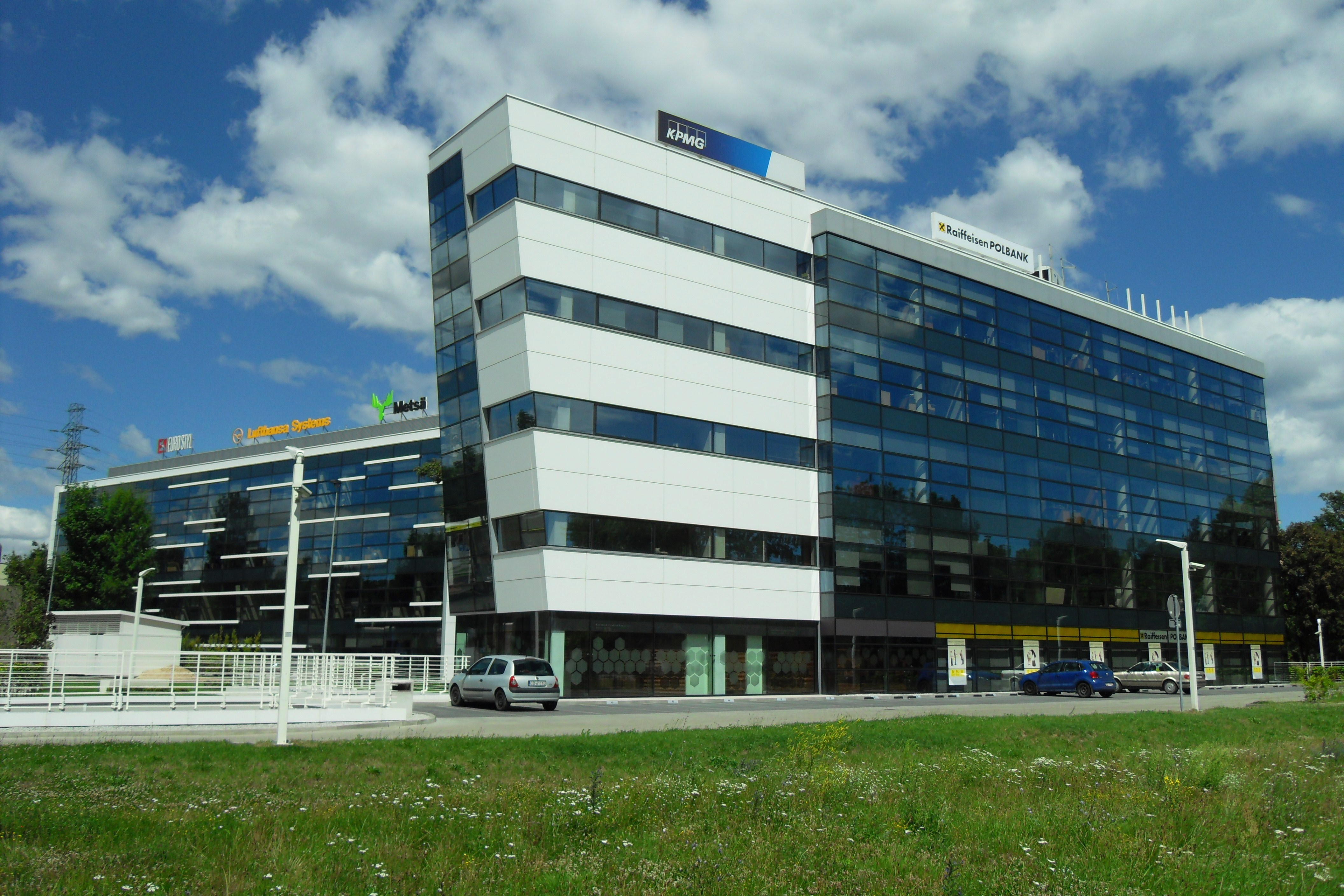 Gdańsk Aniołki. Al Zwycięstwa 13a, "Opera Office".